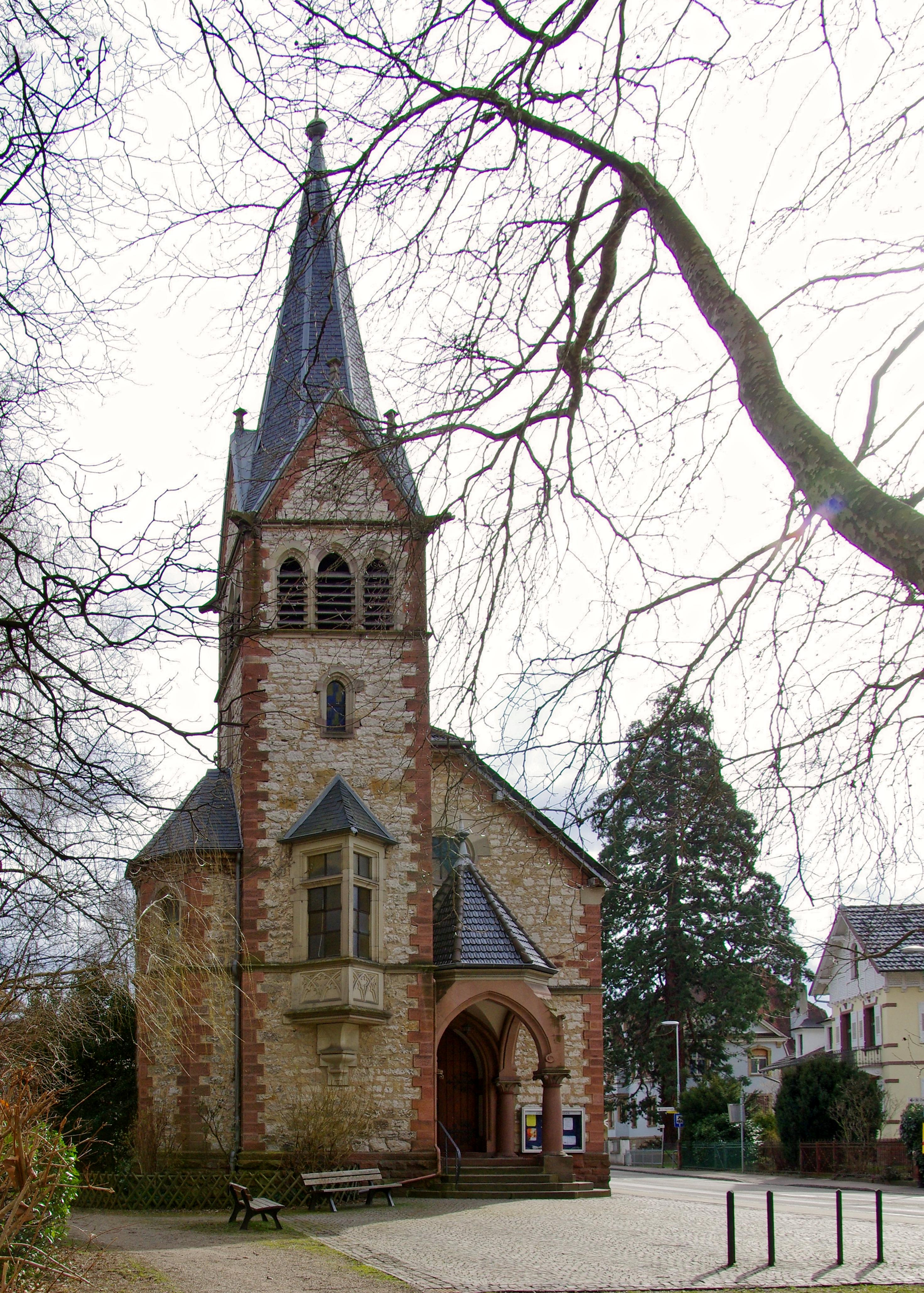 Aussenansicht der Martin Luther Kirche in Staufen im Breisgau